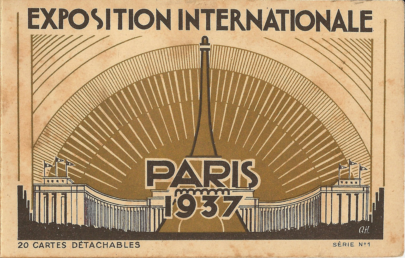 Carte postale de l'Exposition internationale de Paris en 1937